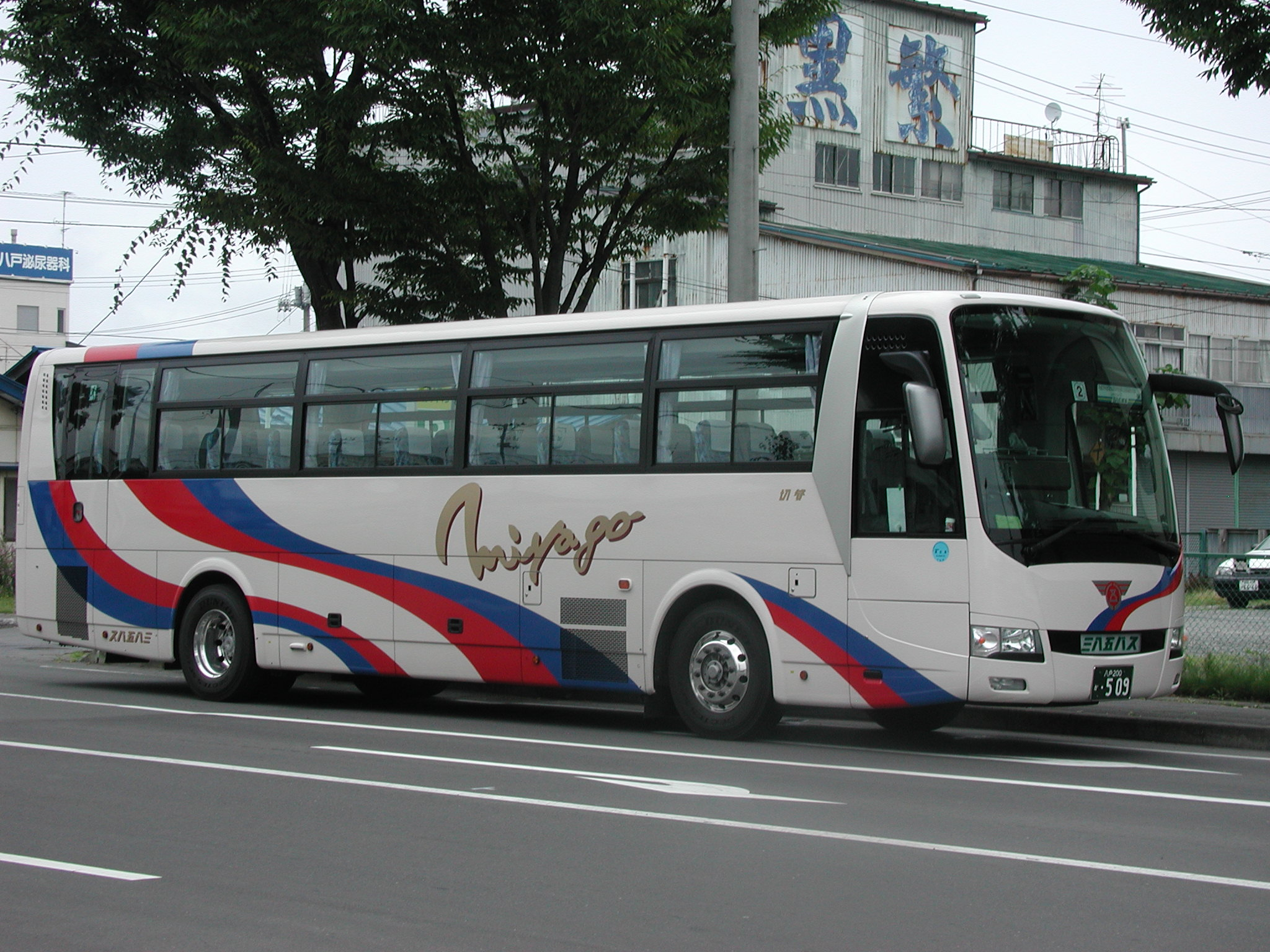 三八五バス：三八五グループバス事業新塗装 三菱ふそう・エアロエース（BKG-MS96JP） 本八戸駅付近にて